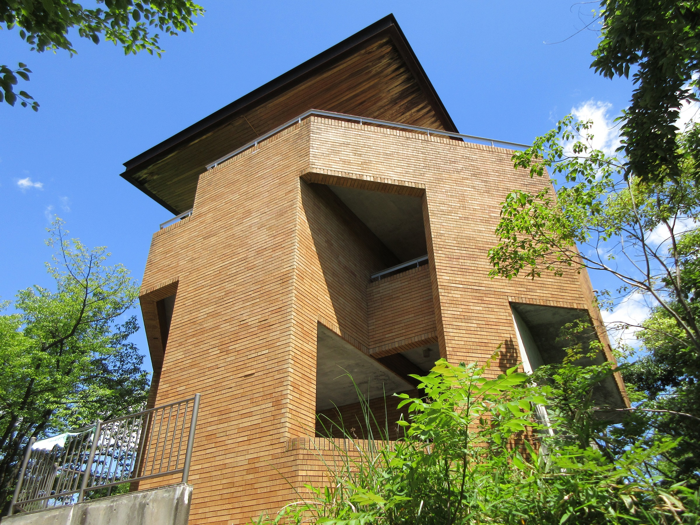 竜美ヶ丘公園（岡崎市竜美東）